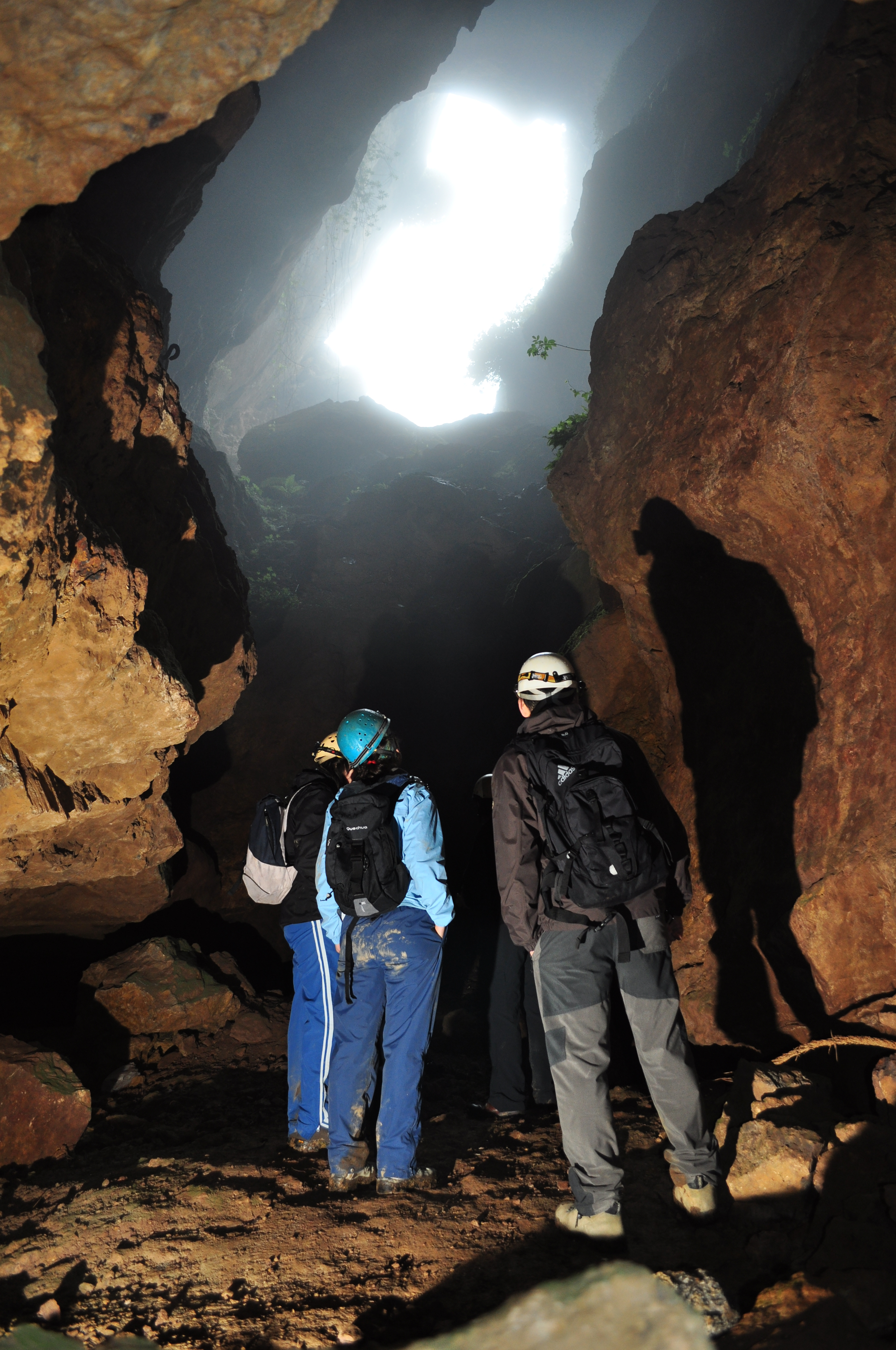 Bioespeleologoak Urallaga Sistemako kobazulo batean (Trianoko mendiak, Galdames).